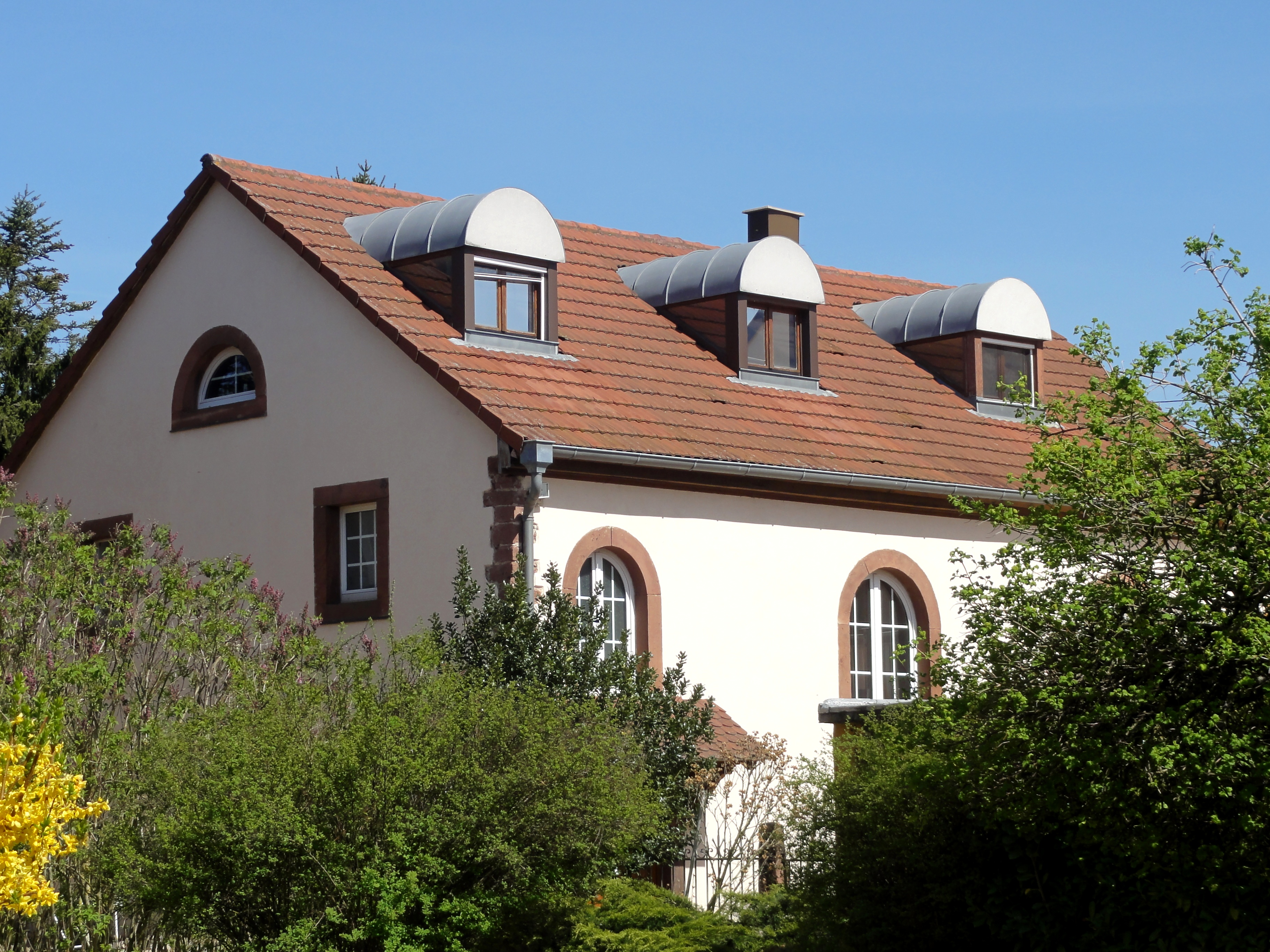 Alsace, Bas-Rhin, Kolbsheim, Ancienne synagogue (XVIIe), rue de la Liberté.